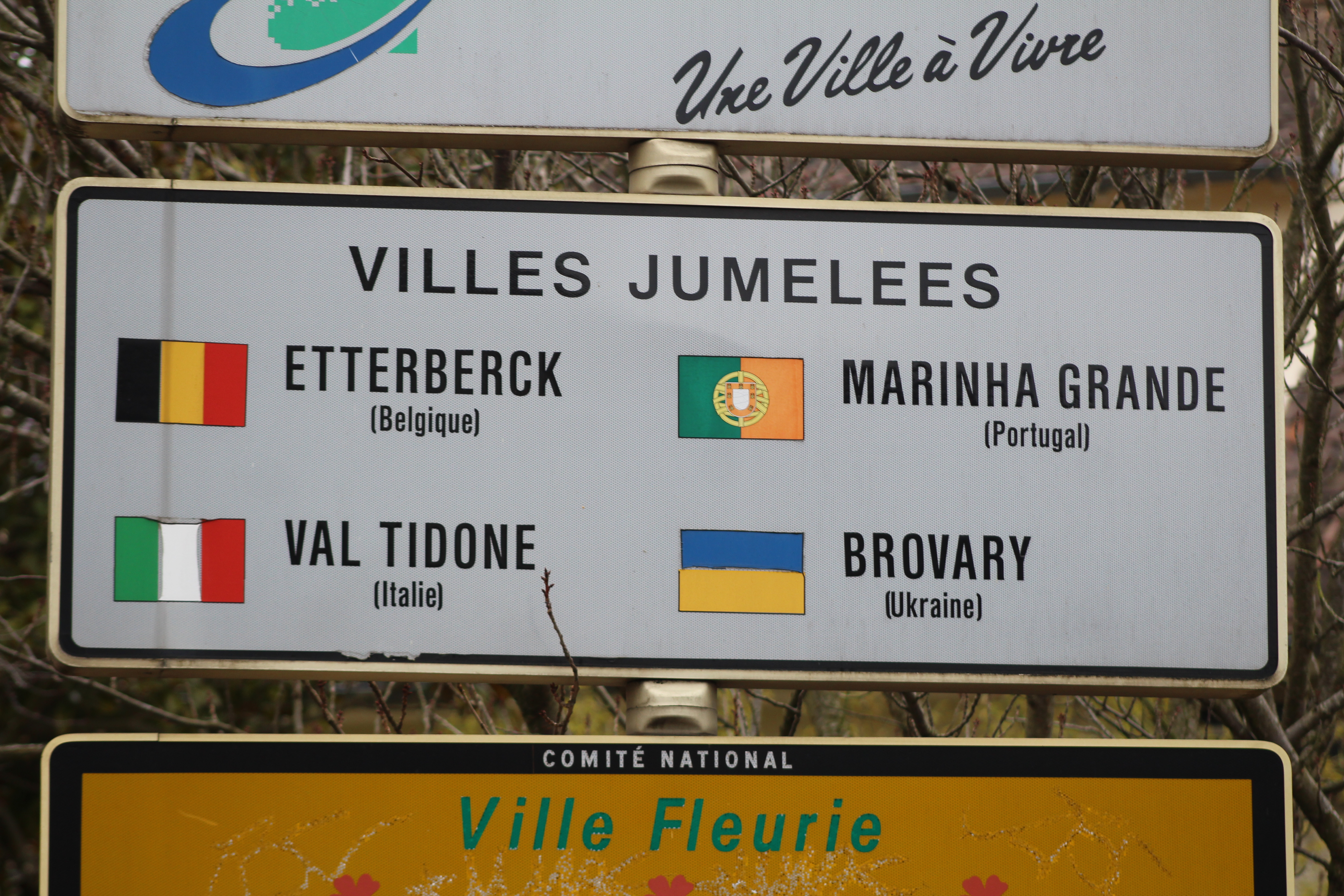 Panneau de jumelage de Fontenay-sous-Bois depuis Nogent-sur-Marne le long de la rue de Joinville.